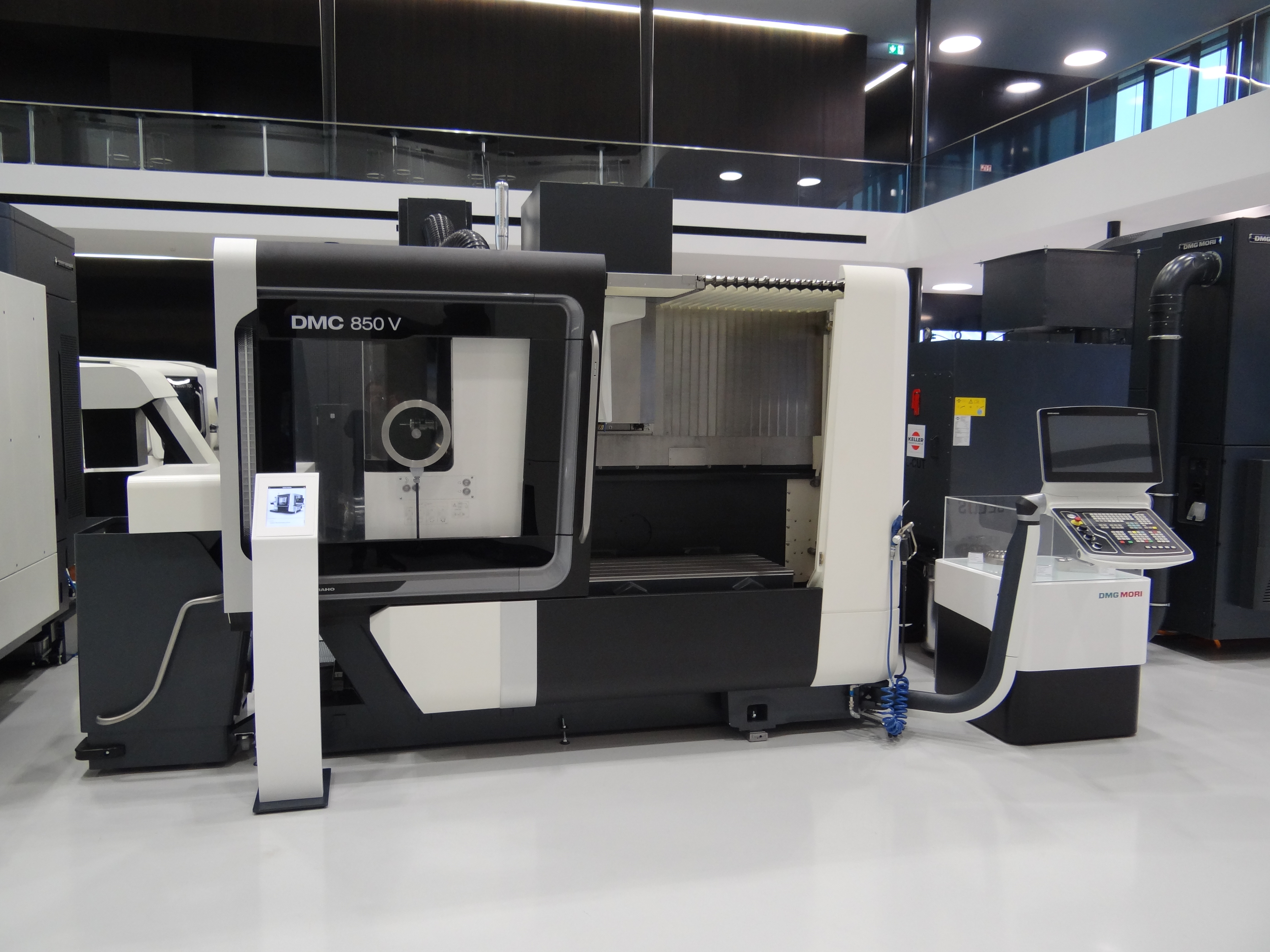 Fräsmaschine